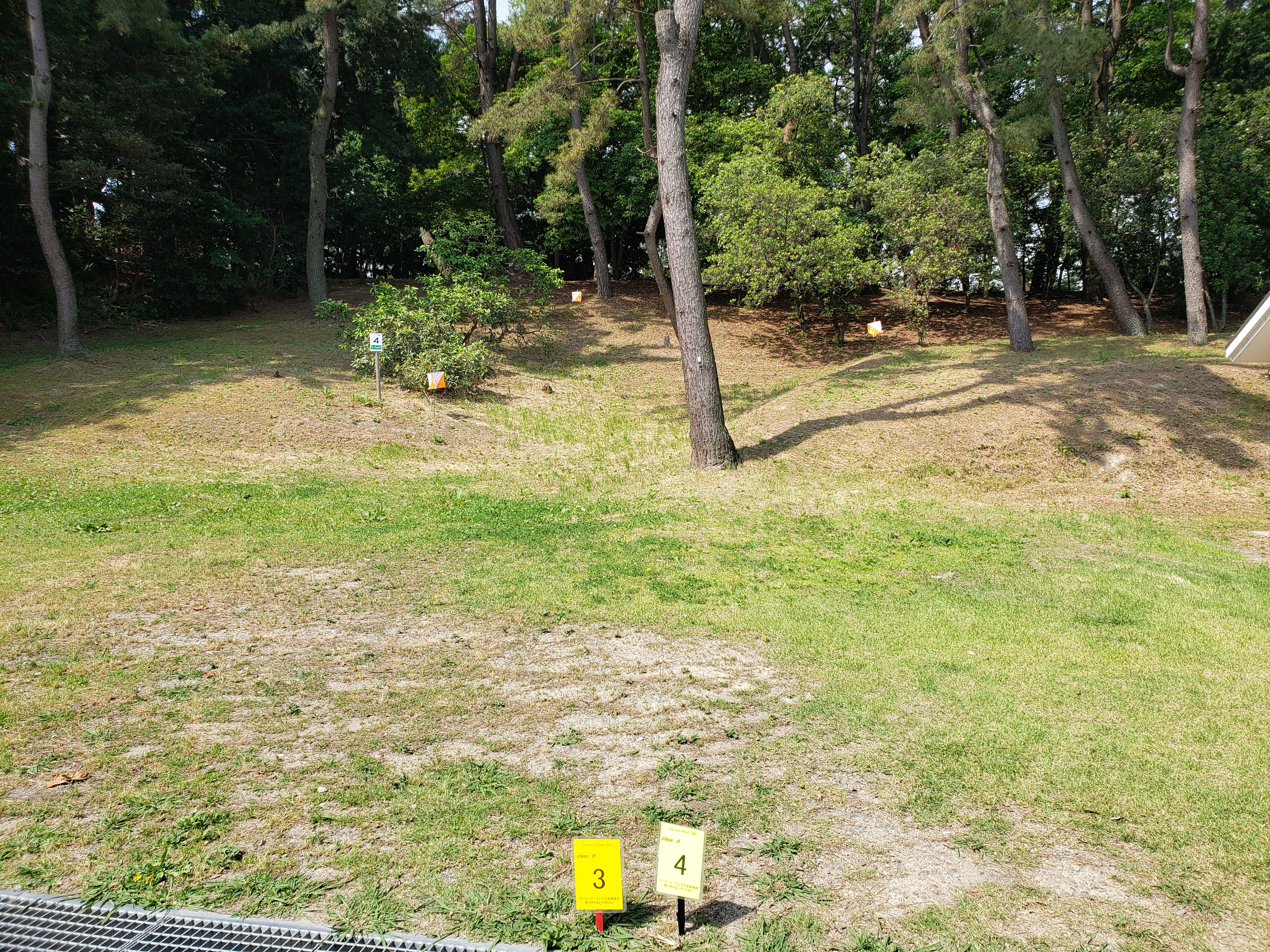 3つのオリエンテーリングフラッグを使用したトレイルOのコントロール。2019年5月26日、愛知県東海市の大池公園にて撮影。